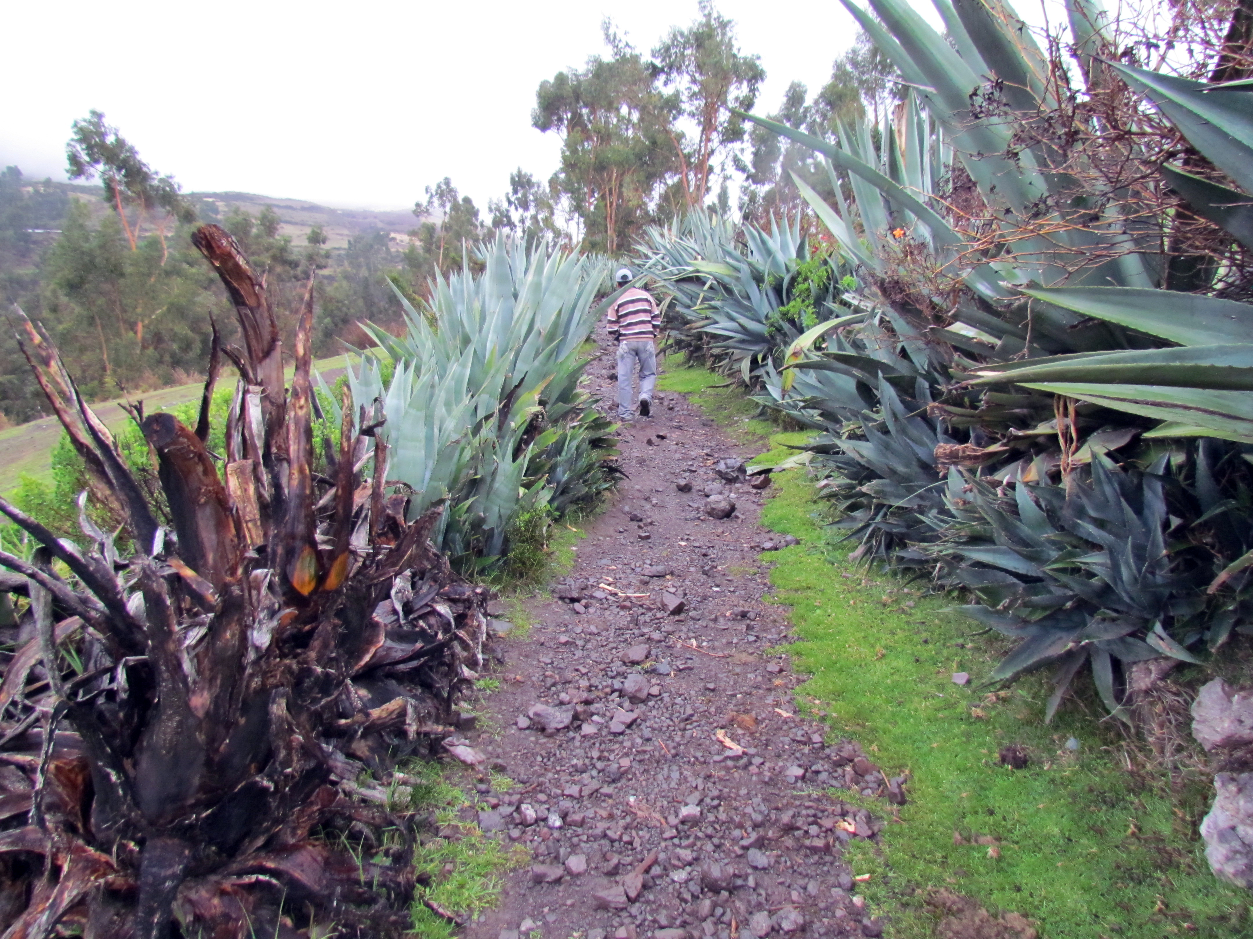 Caminos de herradura que une los pueblos en Aurahua